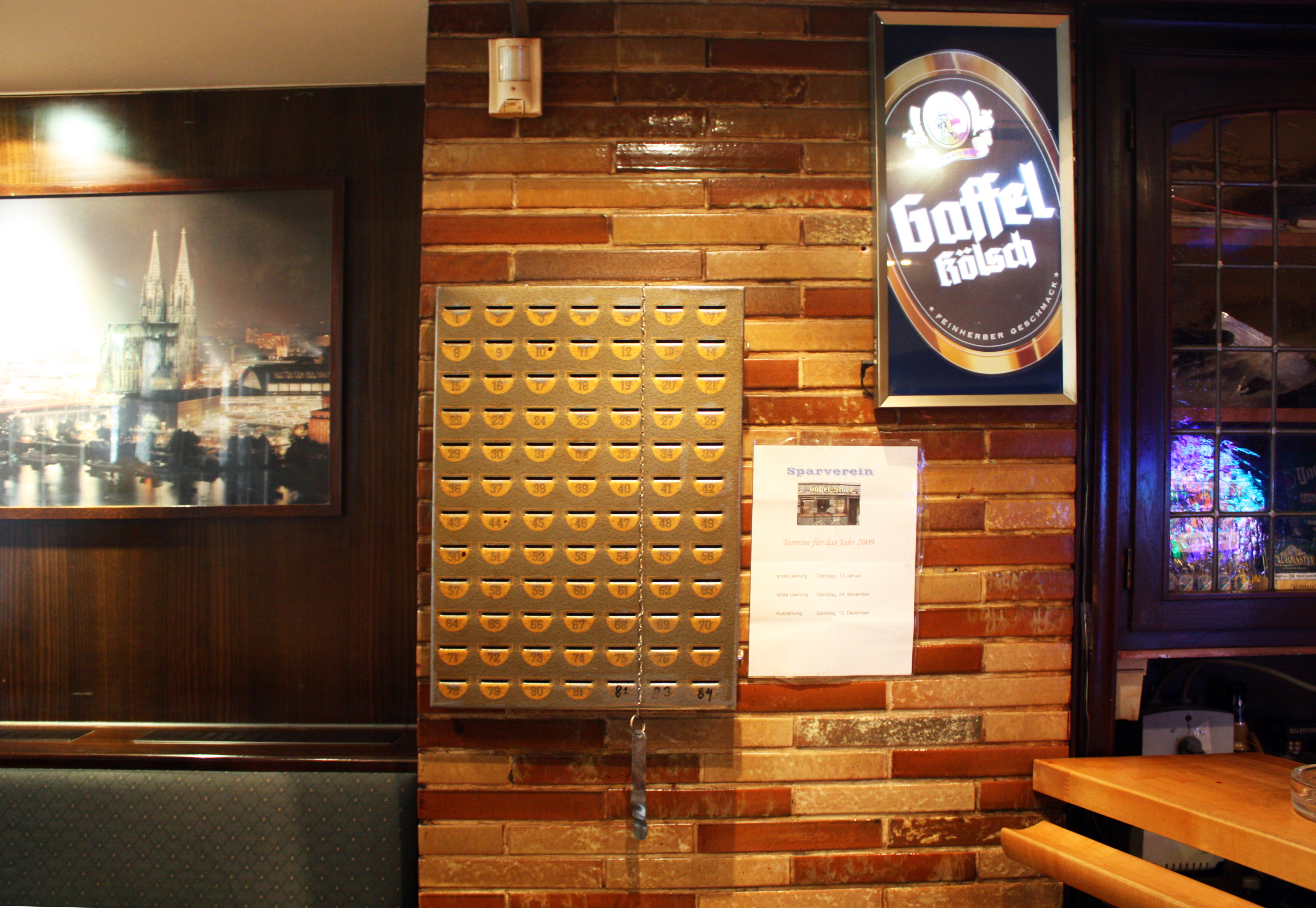 Sparschrank des Sparvereins 'Gaffelklause', Kölner Südstadt